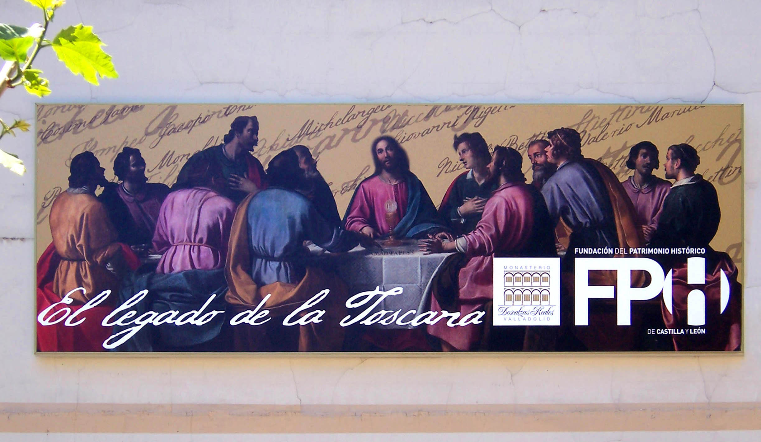 Convento de las Descalzas Reales de Valladolid (España). Cartel de la exposición "El legado de la Toscana" 2007 puesto sobre la pared exterior del monasterio.